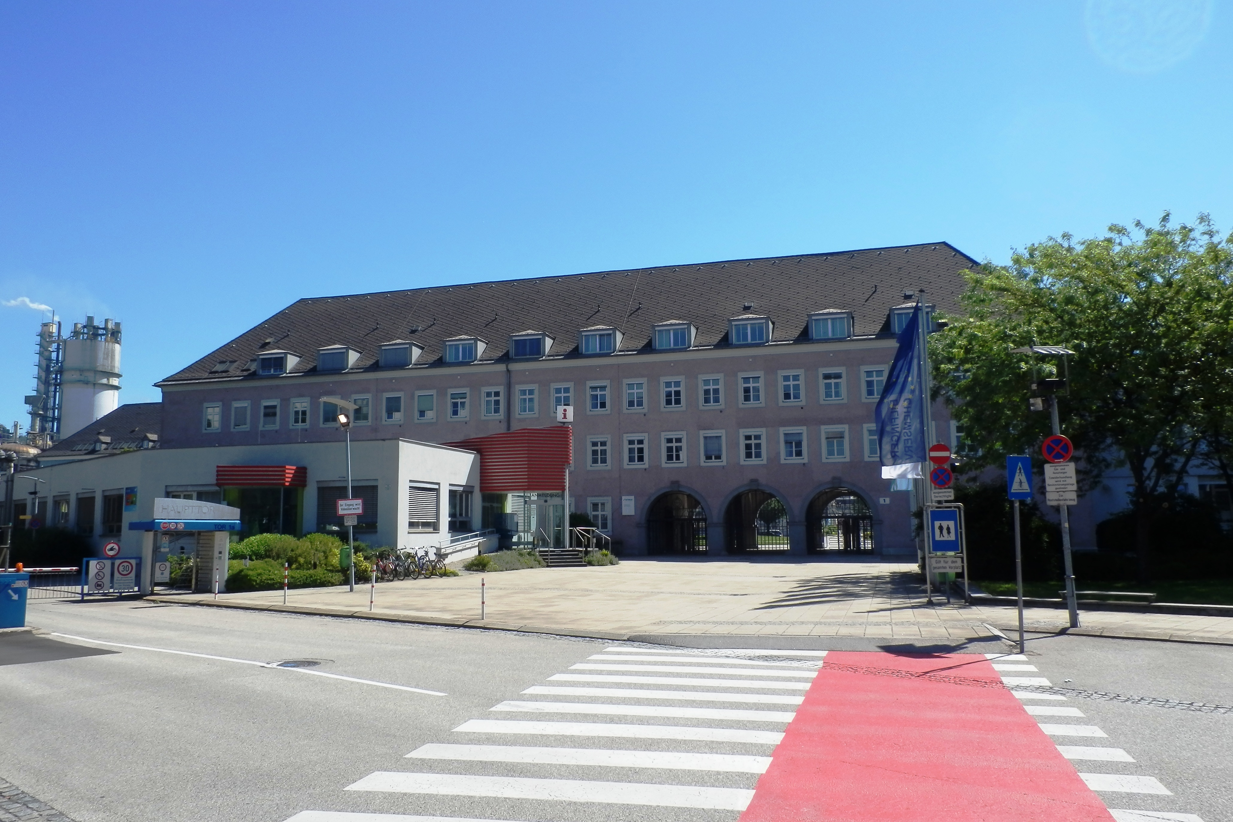 Direktionsgebäude der ehemaligen Chemie Linz AG (Stickstoffwerke) - Linz Buchnerplatz